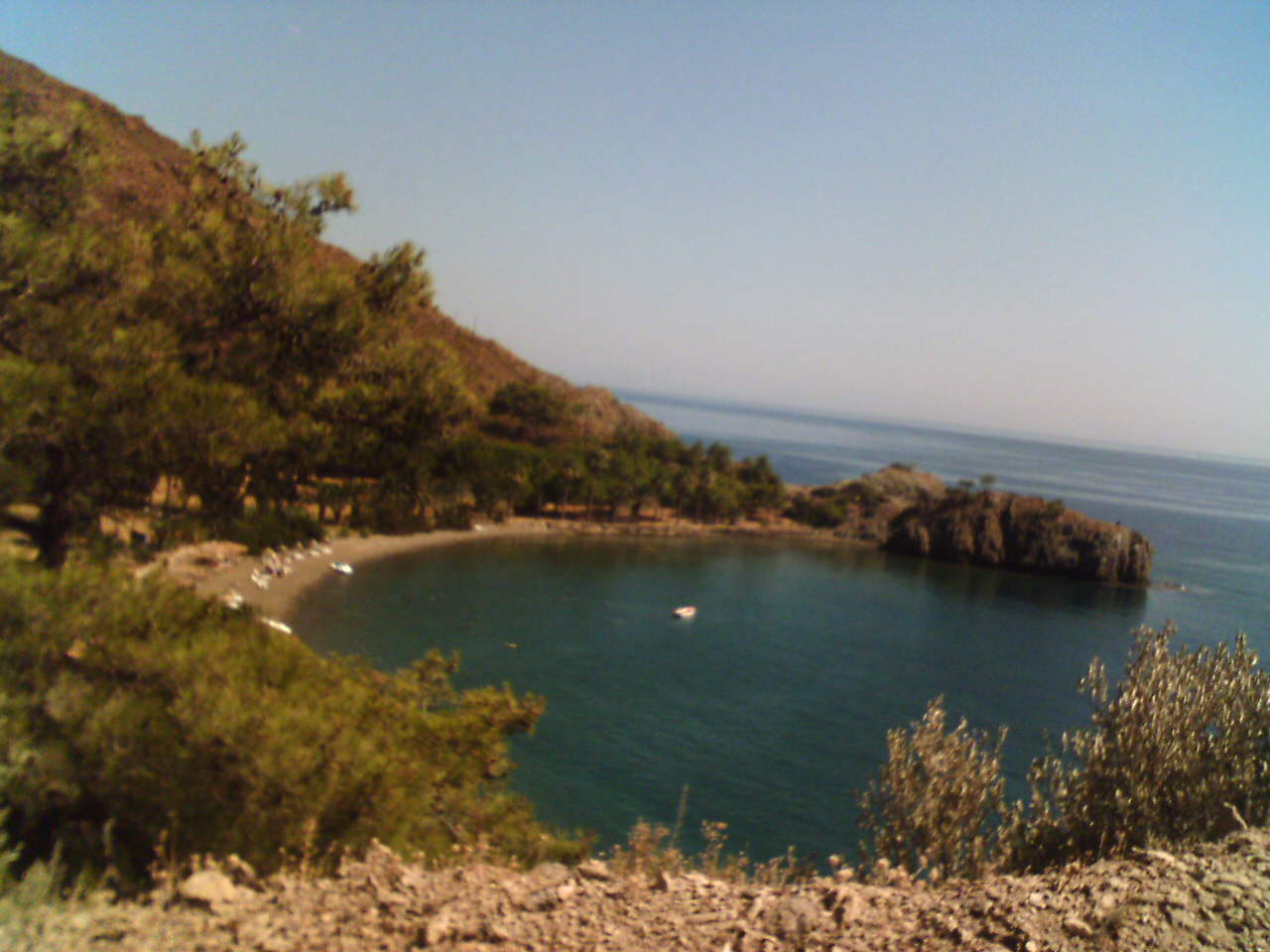 Dosya yükleyen kullanıcıya aittir. Resim Datça Yarımadası'nda çekilmiştir.